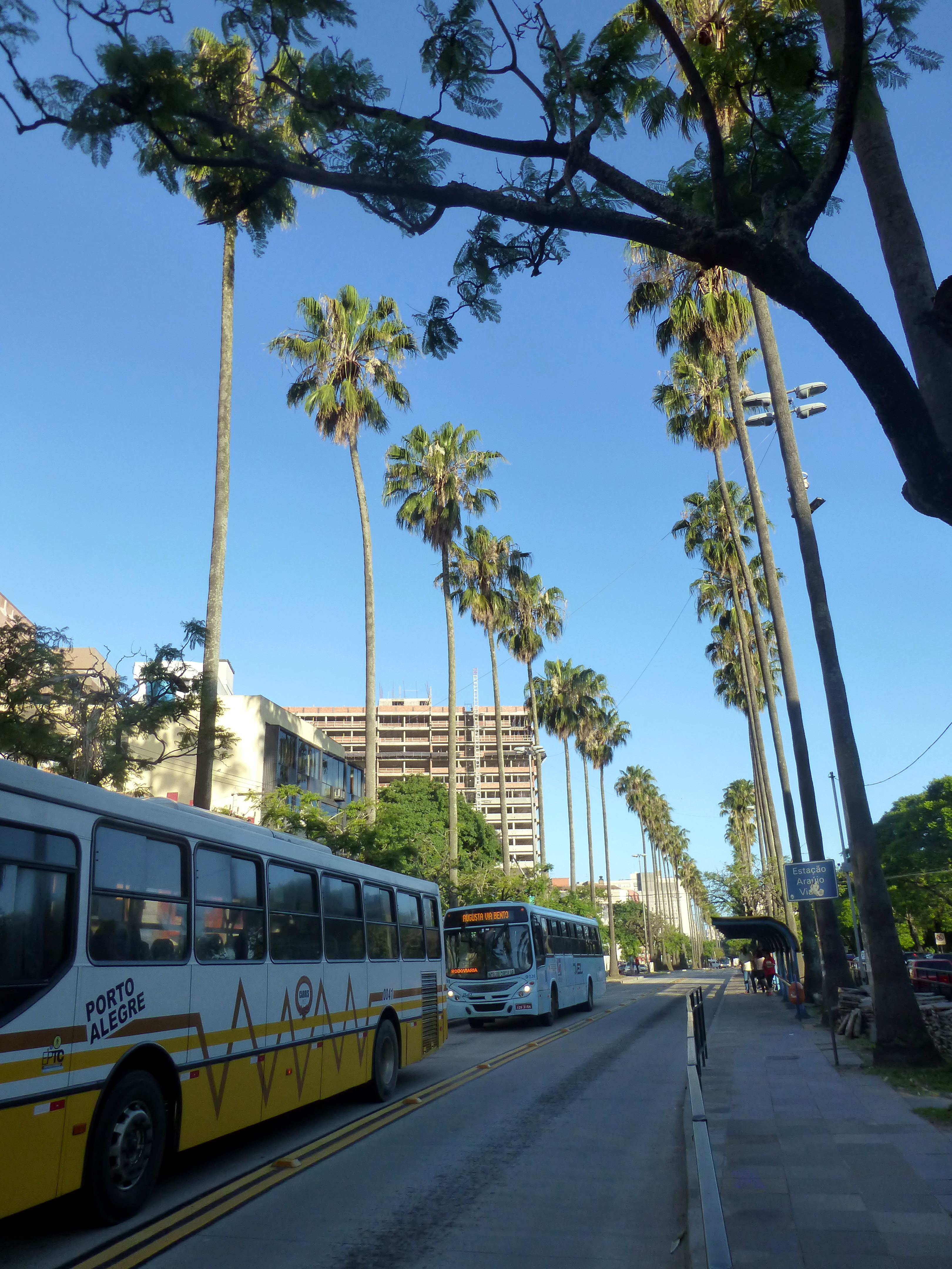 Avenida Osvaldo Aranha en la ciudad de Porto Alegre, Rio Grande do Sul, Brasil.